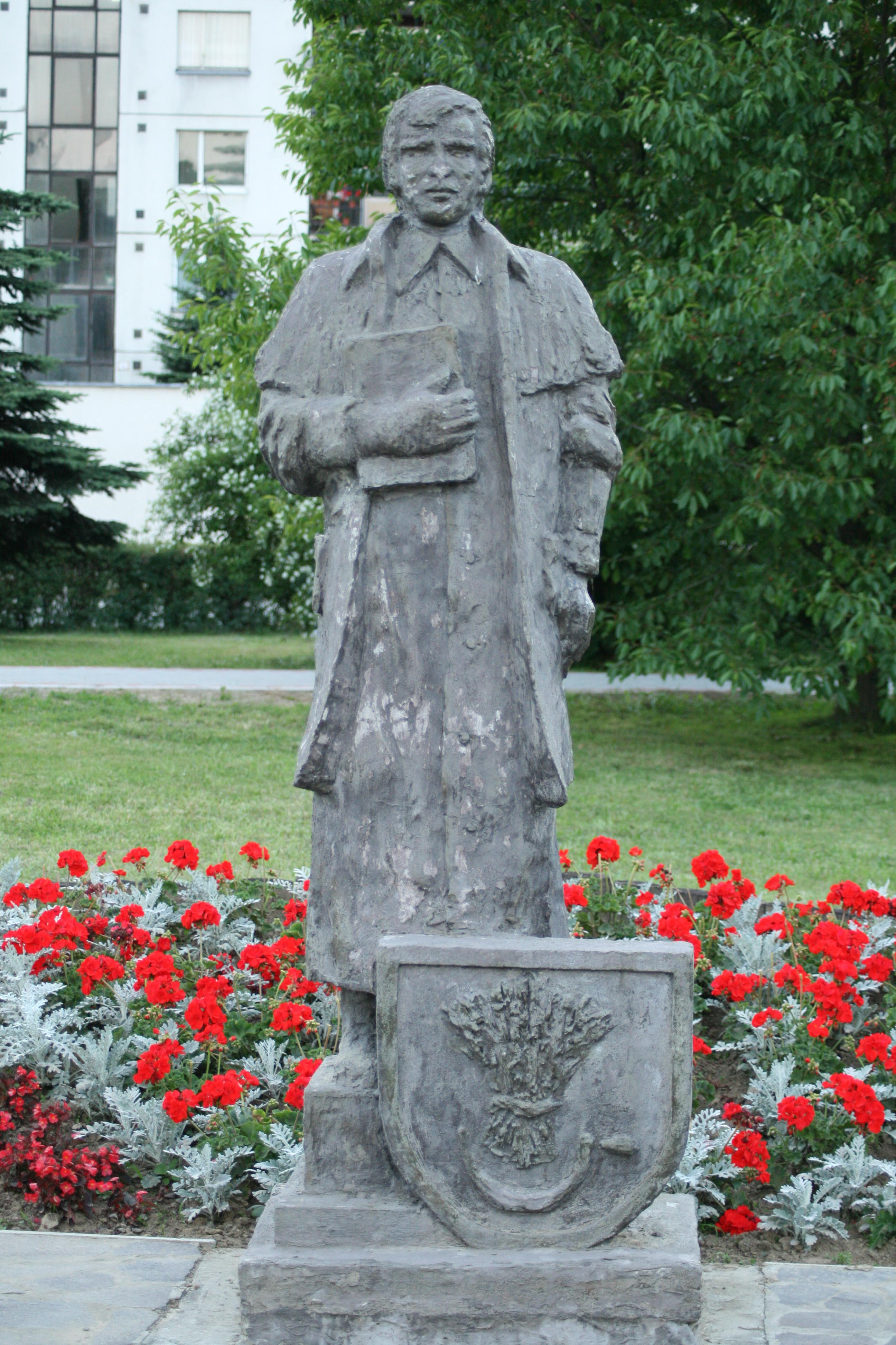 Socha Adama Hlovíka (1792-1851) autora národno-buditeľskej zbierky šarišských ľudových piesní, ktorú dal k dispozícii Jánovi Kollárovi